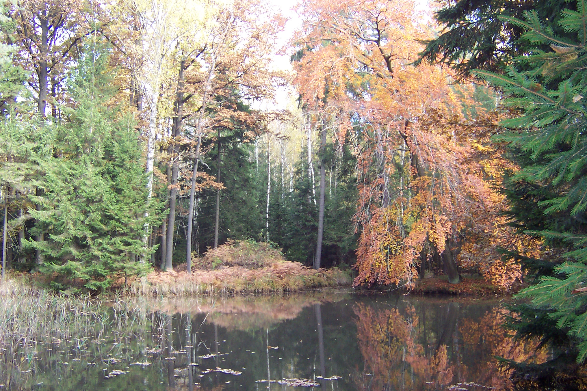 typischer Baumbestand am Märchensee